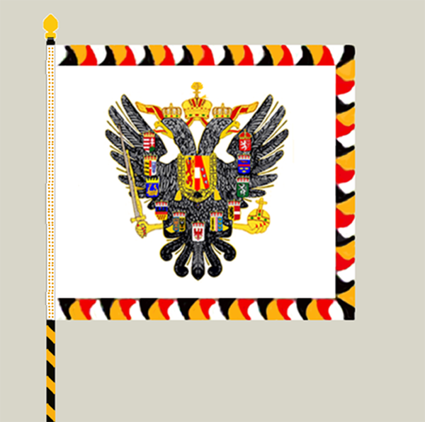 k.u.k. Regimentsfahne Vorderseite (ausgenommen die Infanterie-Regimenter Nr. 2, Nr. 4, Nr. 39, Nr. 41 und Nr. 57) sowie Vorderseite der Truppenfahne der k.k. Landwehr